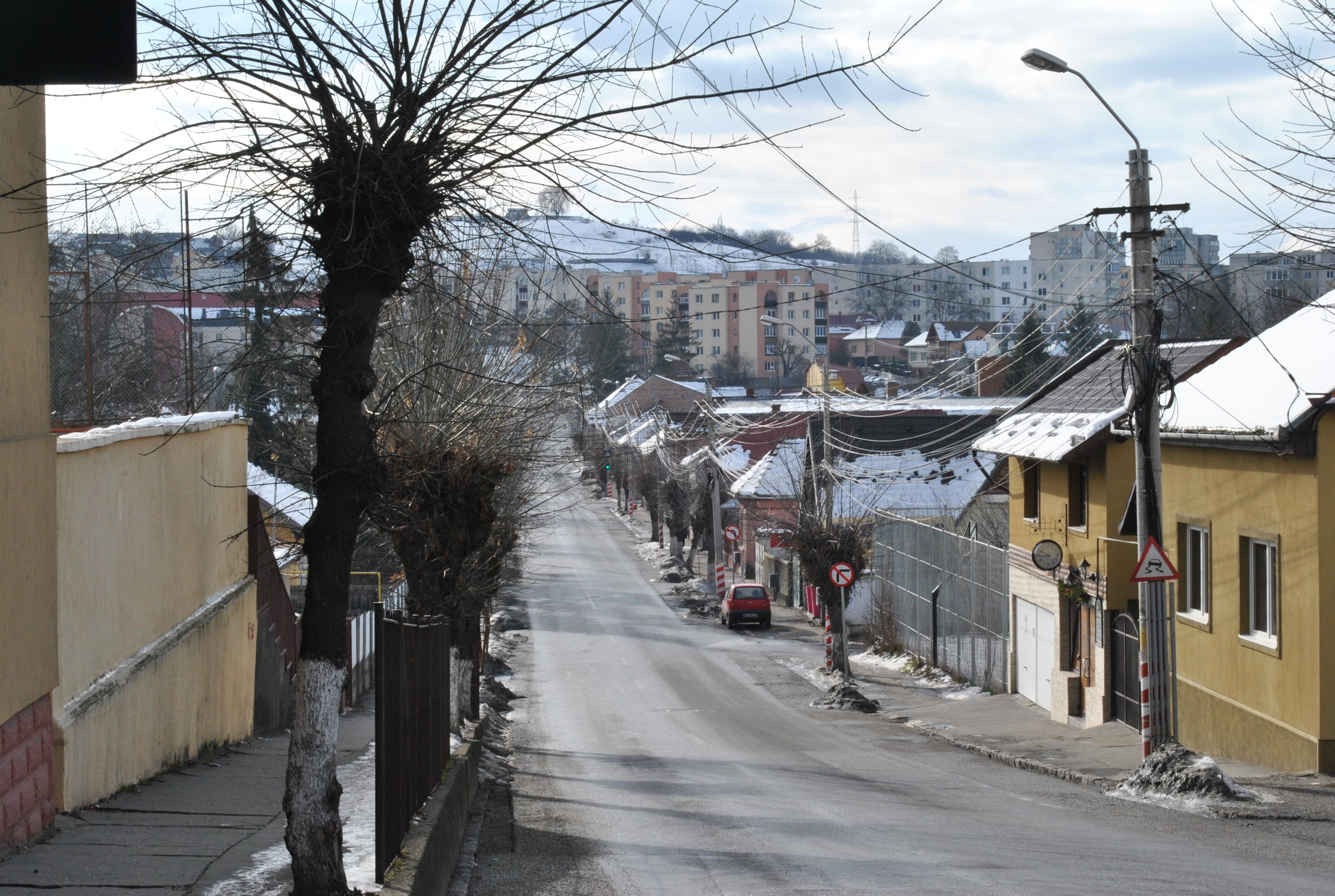 Ansamblul urban "Case muncitorești"